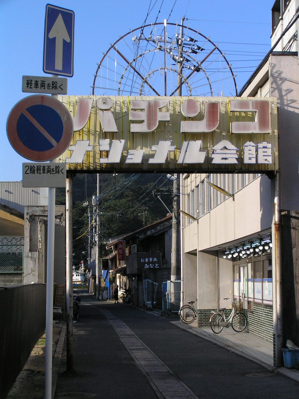 境港水木ロード ～photo by Autumn Snake 【おぉたむすねィく探検隊】